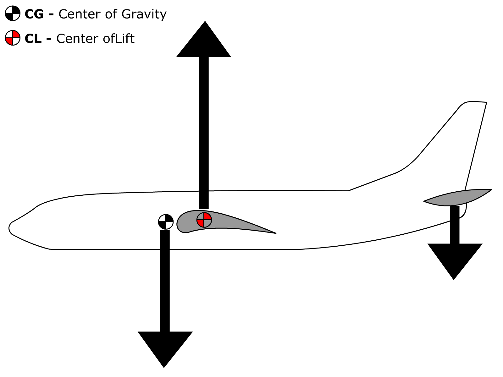 Balance der aerodynamischne Kräfte am Flugzeug - Massenschwerpunkt - vor dem Auftriebsschwerpunkt - ausbalanciert durch Abwärtskräfte am Höhenruder